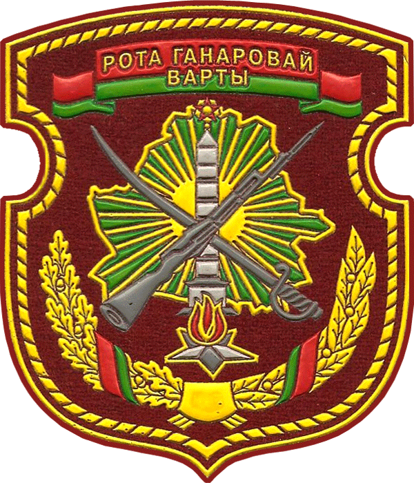 Парадны нарукаўны знак роты ганаровай варты в/ч 3214